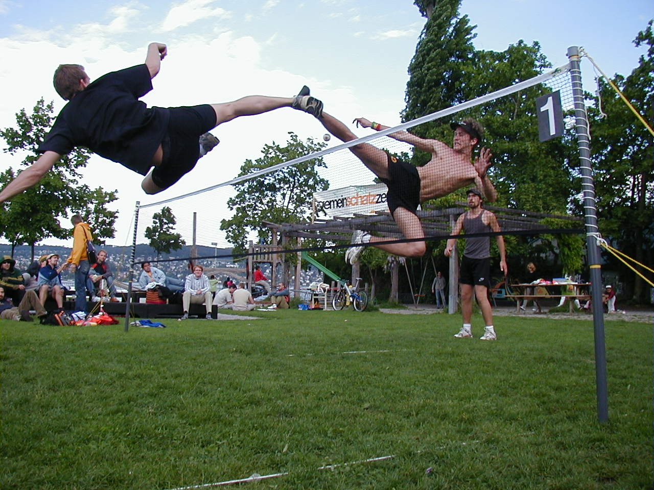 Footbag-Net